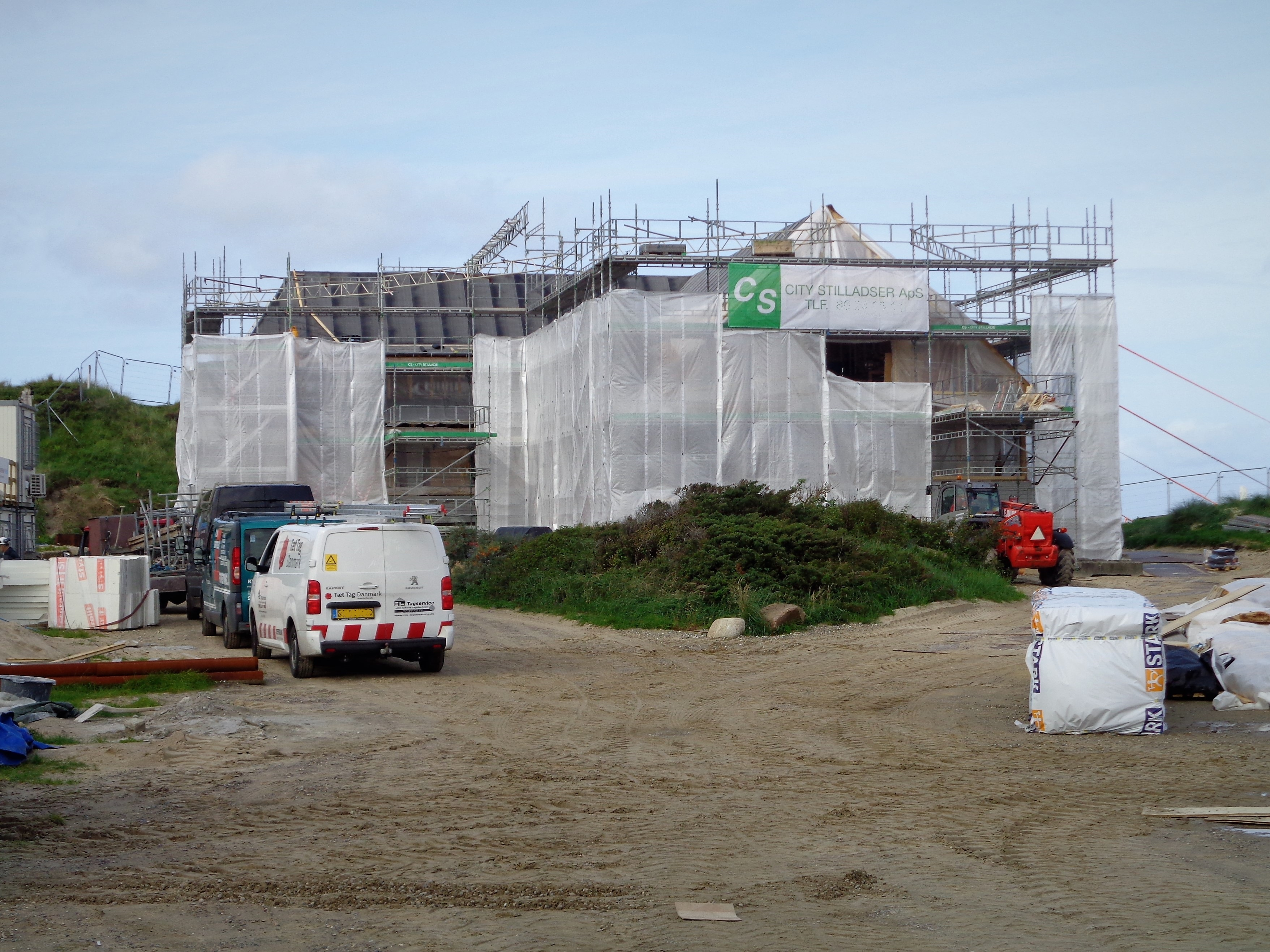 Baufortschritt des Svinklov Badehotels, das nach einem Großbrand im Jahr 2016 wieder aufgebaut wird.